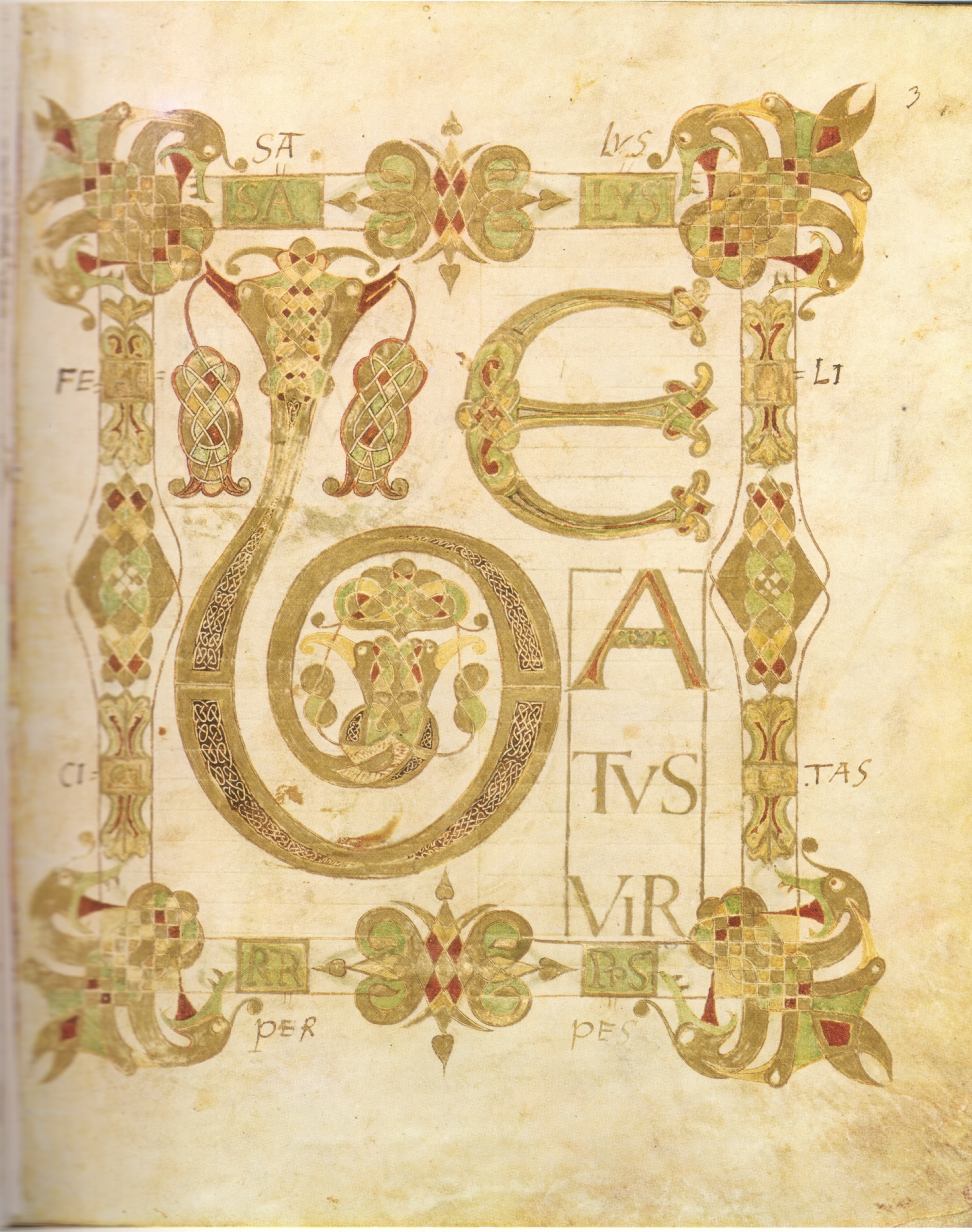 Berlin, Staatsbibl., Ms. theol. lat. fol. 58 (3r) Psalter Ludwigs des Deutschen Saint-Omer, 2. Viertel d. 9. Jahrhunderts Initialseite zu Psalm 1